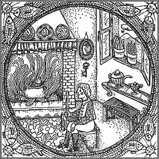 Иллюстрация Каhмен Андрада к испанскому изданию "Три апельсина любви и другие испанские сказки", сост.Кармен Браво-Вильясанте)